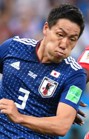 Потрясающий камбэк сборной Бельгии в матче с Японией